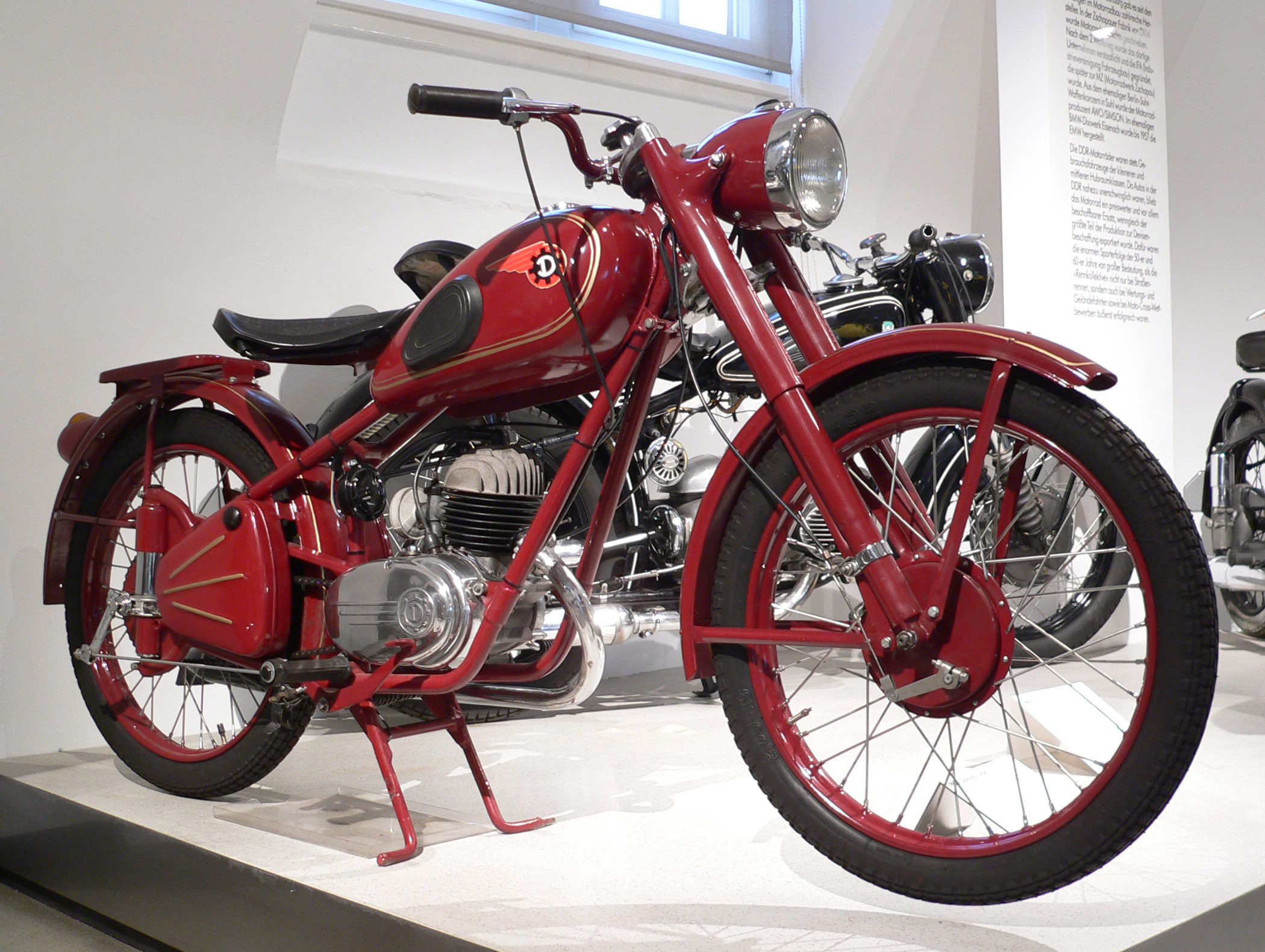 Motorbike "Danuvia-Csepel" (1956) at the Deutsches Zweirad- und NSU-Museum (123 cm³, Einzylinder-Zweitakt-Motor, 4,5 PS, 75 km/h)